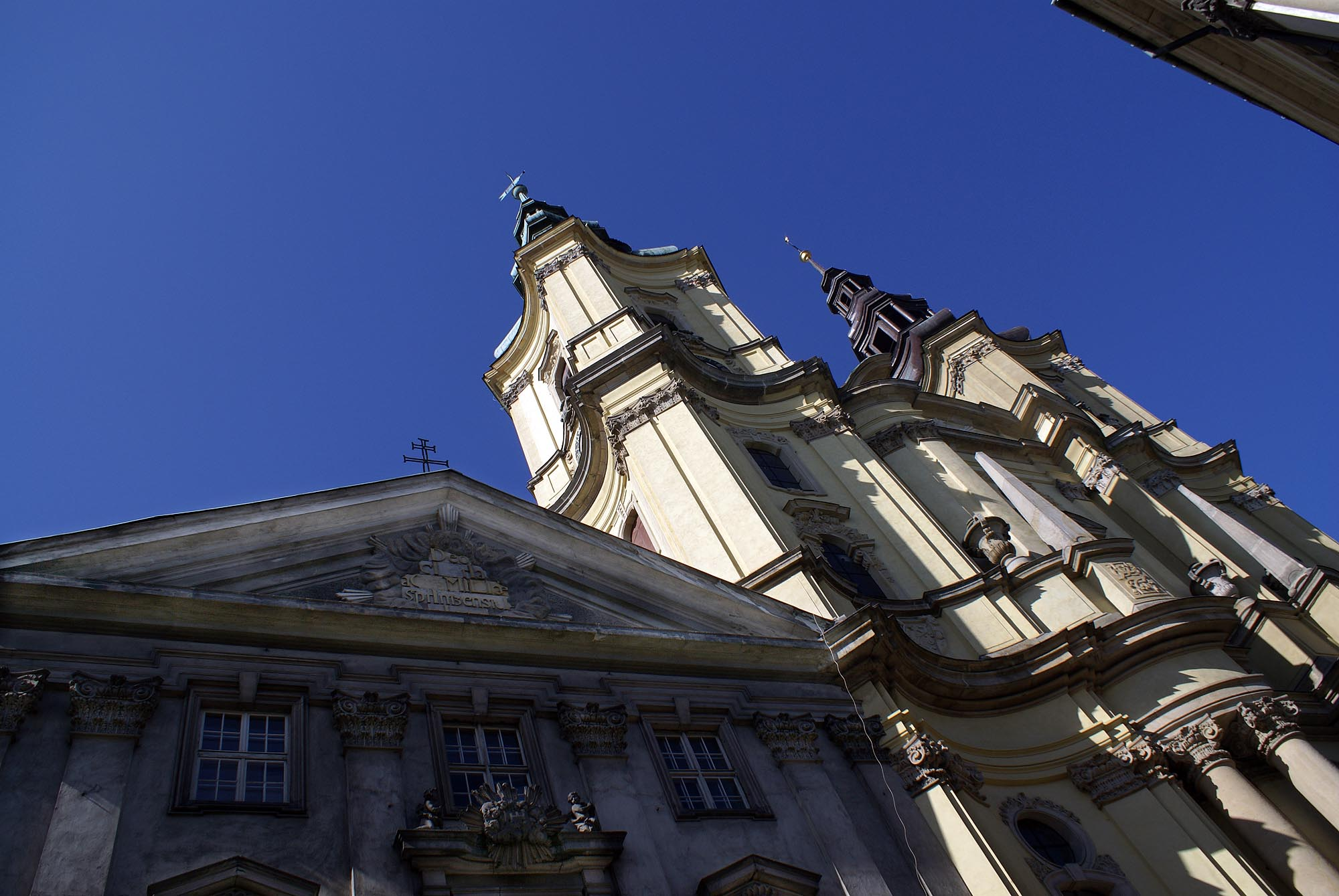 Legnica, ul. Partyzantów 25 - kościół parafialny św. Jana Chrzciciela